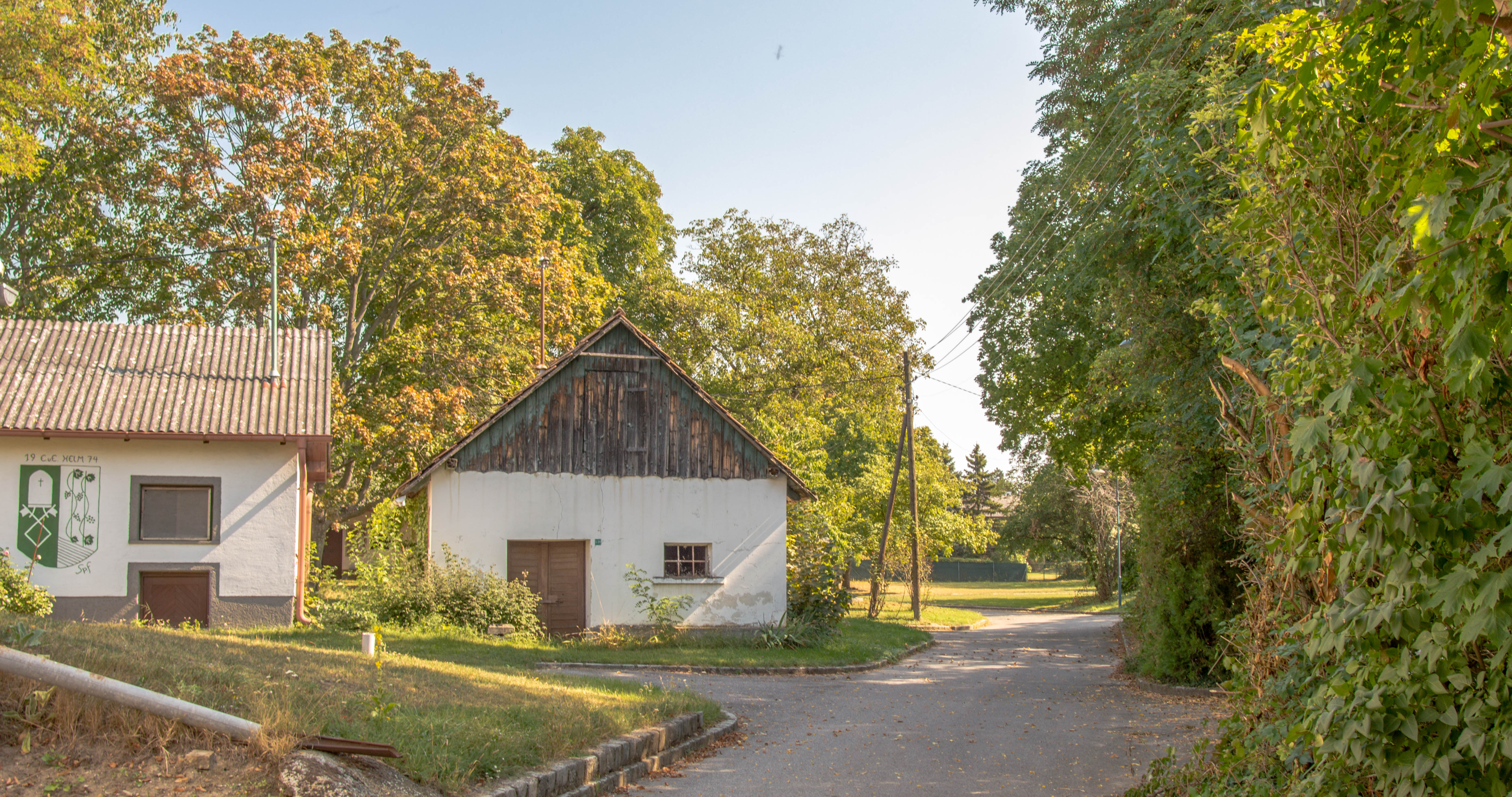 Kellergasse Kellergasse/Ebenthalerstaße (Friedhof) in der KG Prottes in Prottes